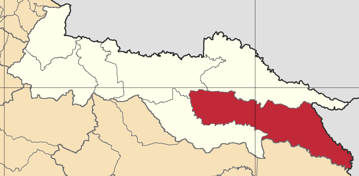 Mapa localizacor del cantón Cuyabeno, Sucumbíos, Ecuador